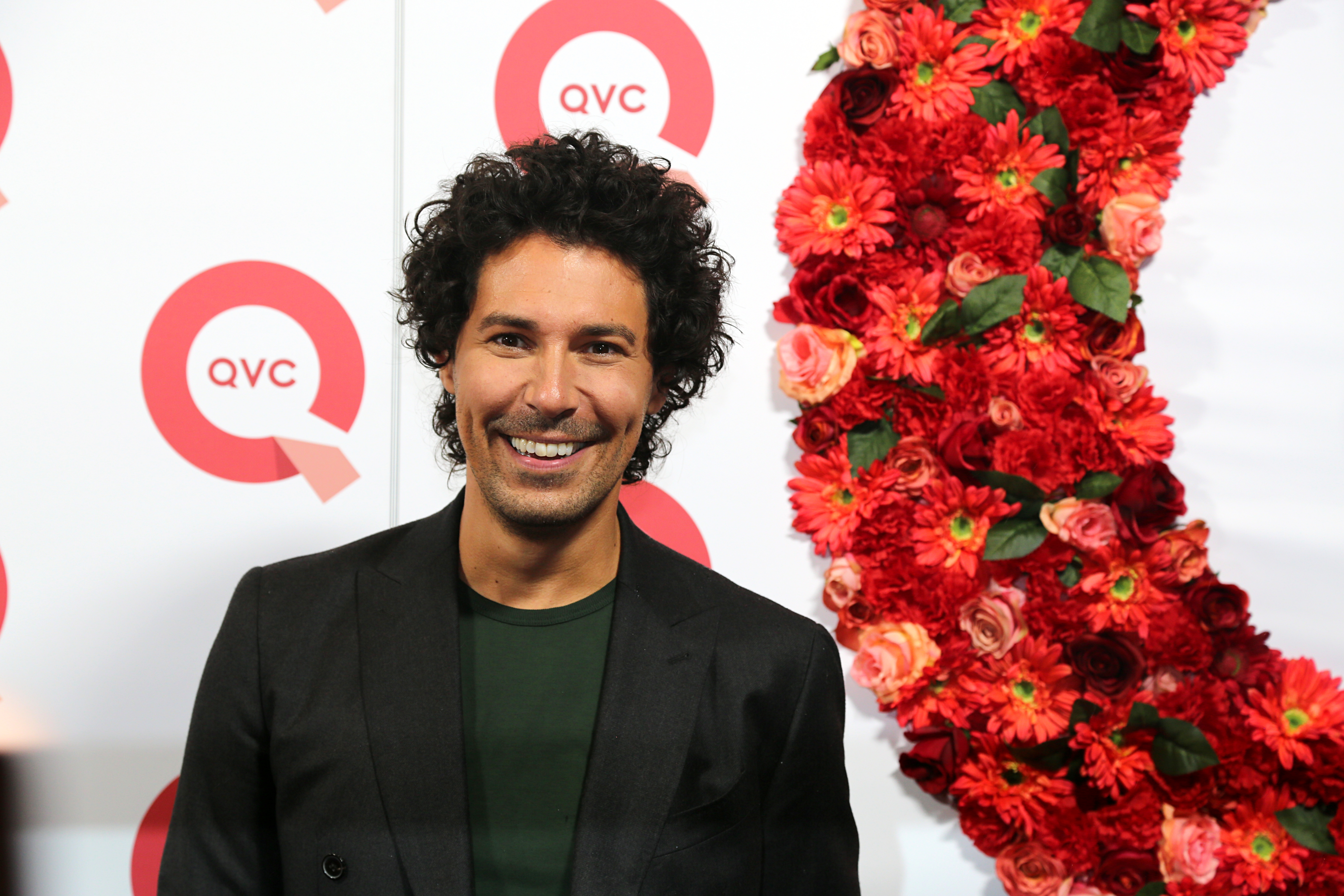 Boris Entrup beim QVC Fashion-Event zur "VOGUE Fashion's Night Out", am 08.09.2017 in Düsseldorf.